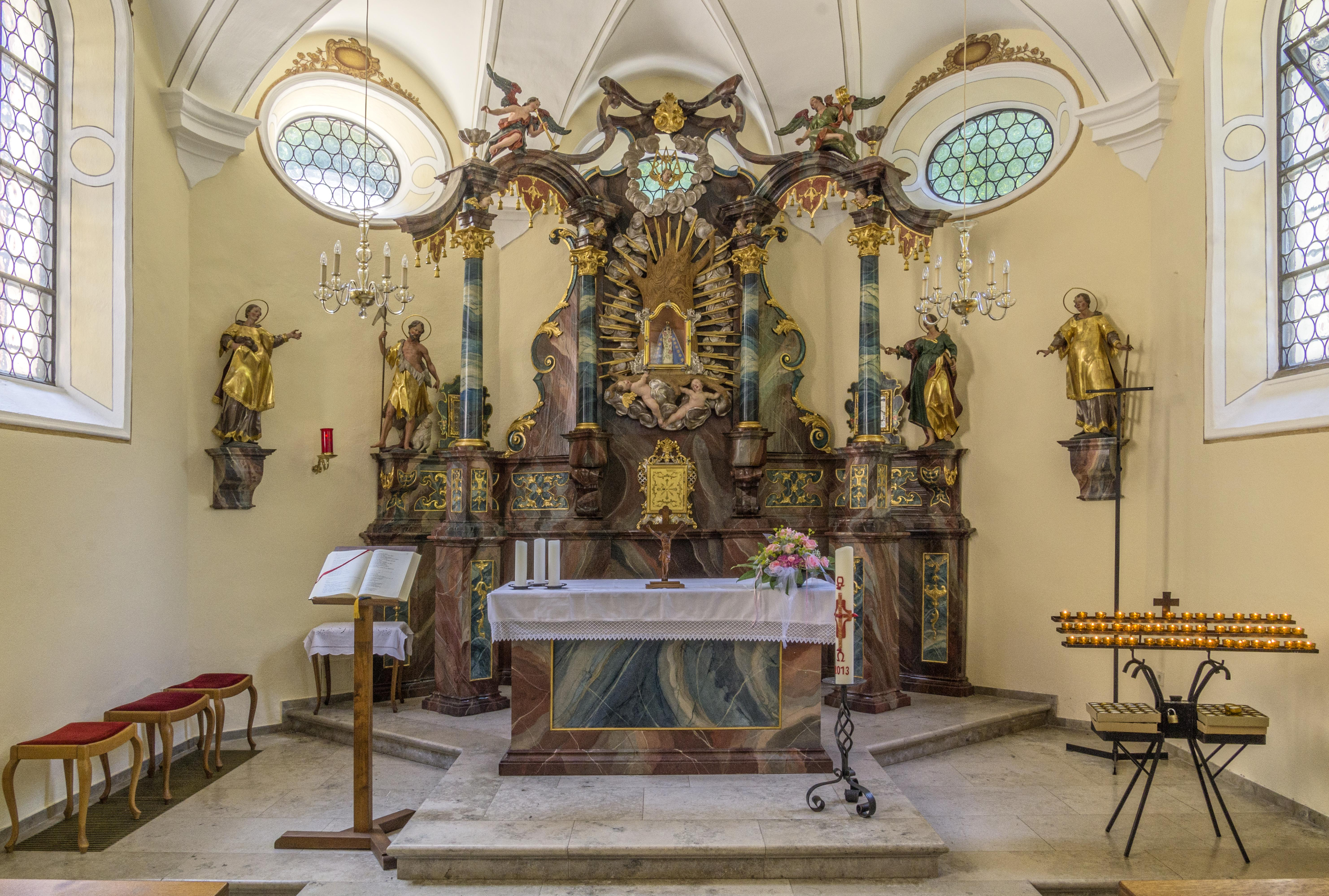 Bilder von der Giersbergkapelle, der Altar